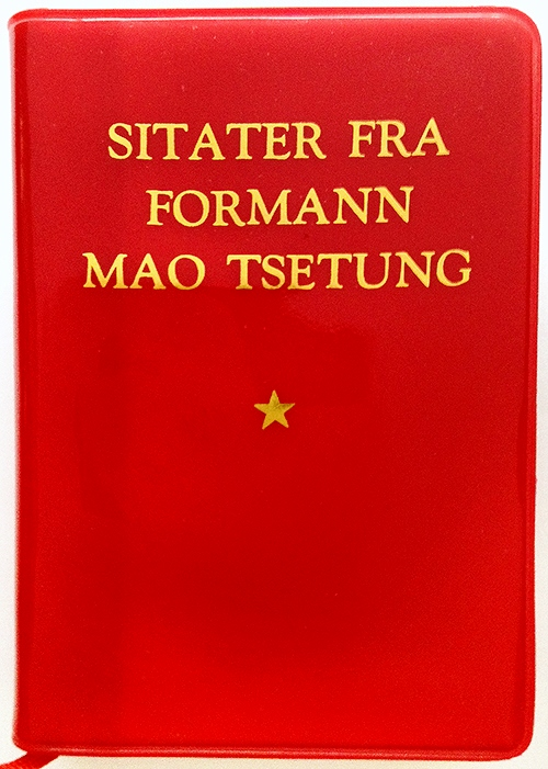 Maos lille røde bok på norsk, versjon fra 1972, trykt i Peking, Forlaget for fremmede språk